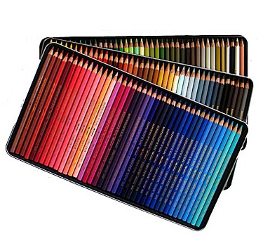 עפרונות צבעי מים של חברת Caran d'Ache.